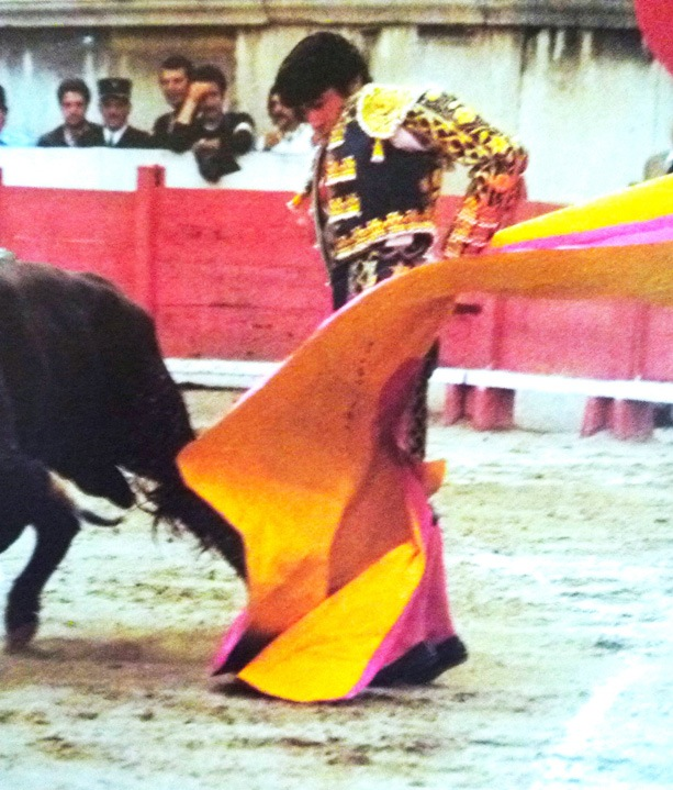 Rebolera3.JPG